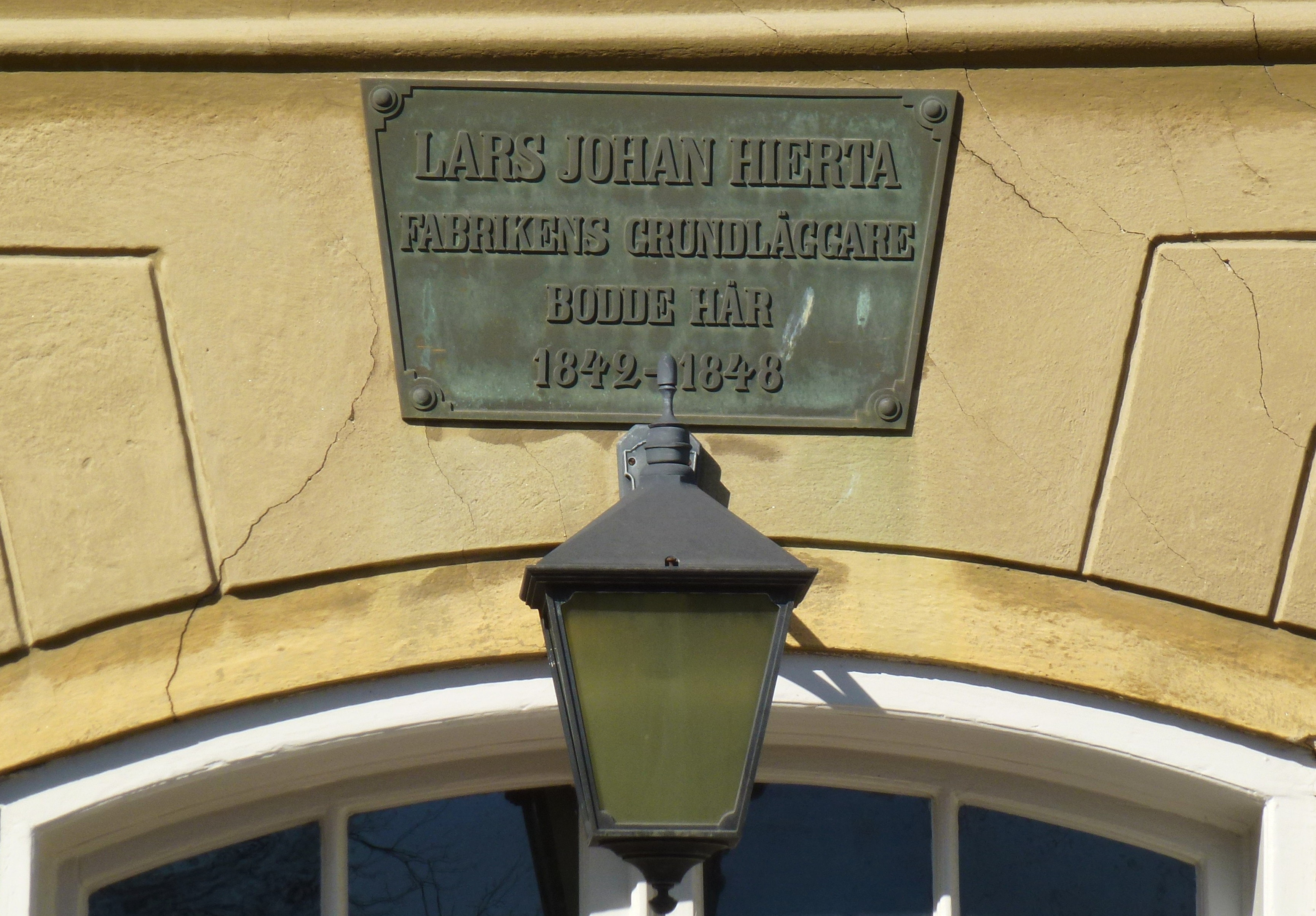 Hovings malmgård vid Danvikskanalen på Södermalm